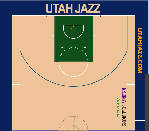 ジャズホームコート配色